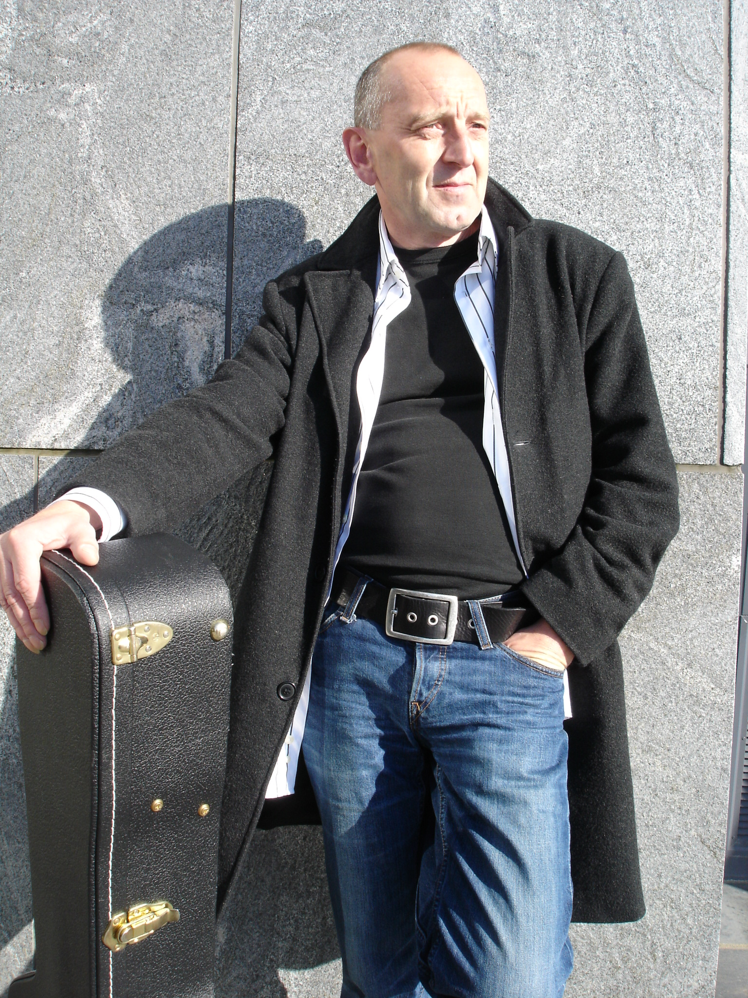 noBjørn Kallevig utenfor oljemuseet, Stavanger